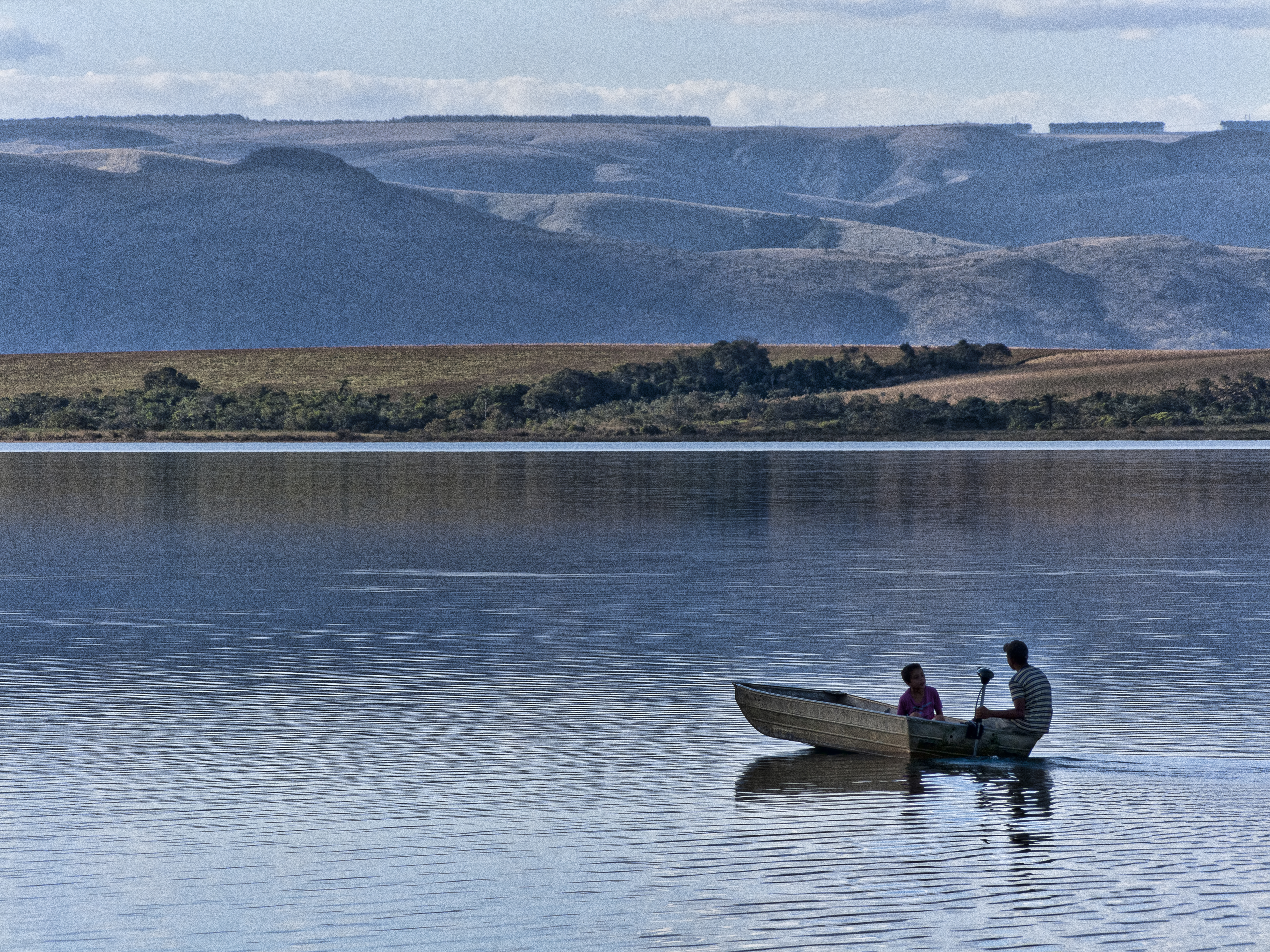 Represa Mascarenhas de Morais